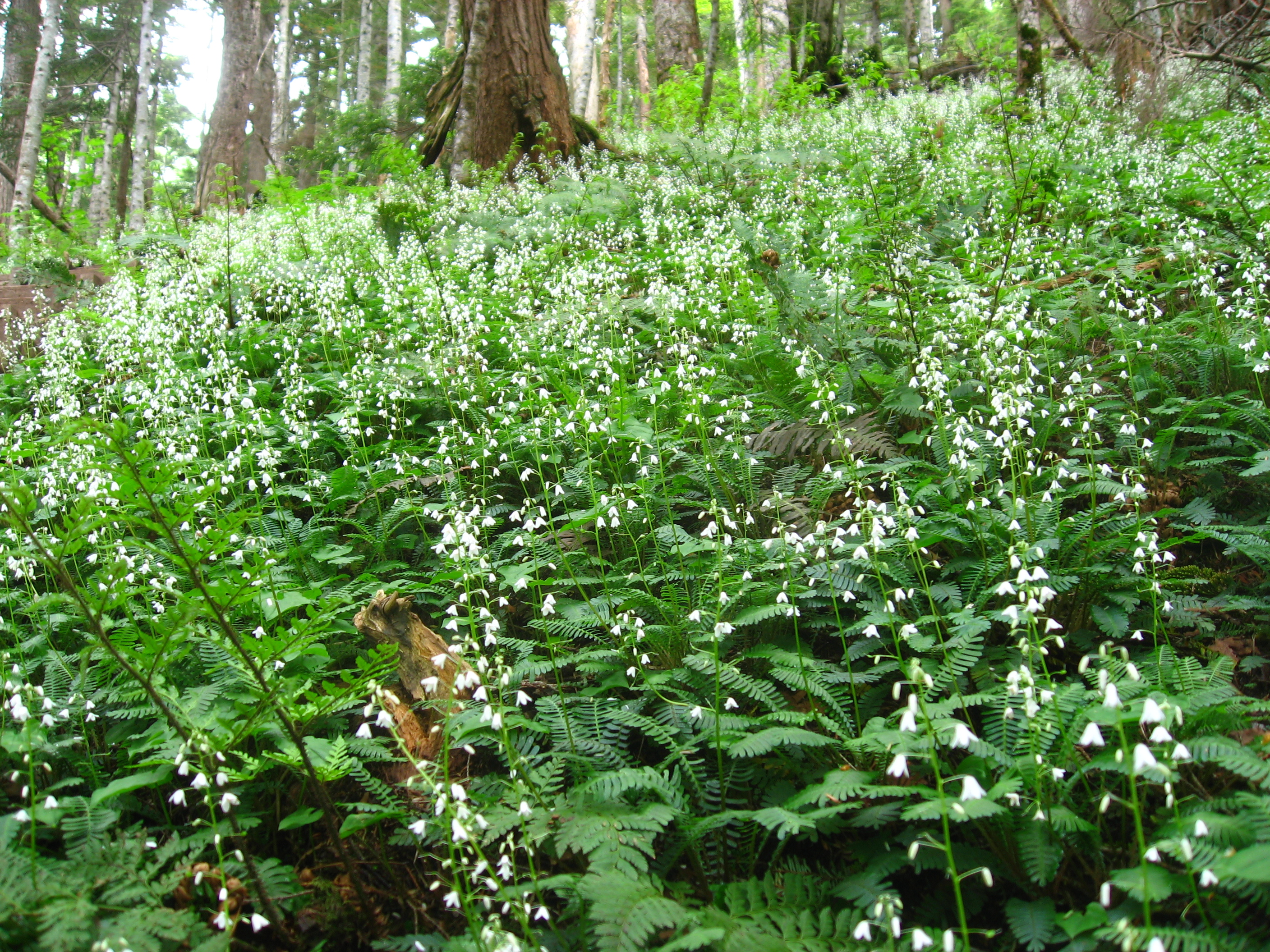 オサバグサ。帝釈山登山道。